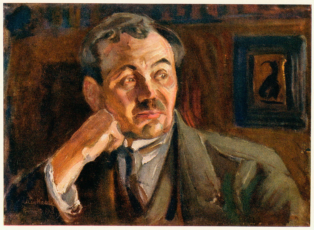 Akseli Gallen-Kallelan maalaus muotokuva Eino Leinosta vuodelta 1917.